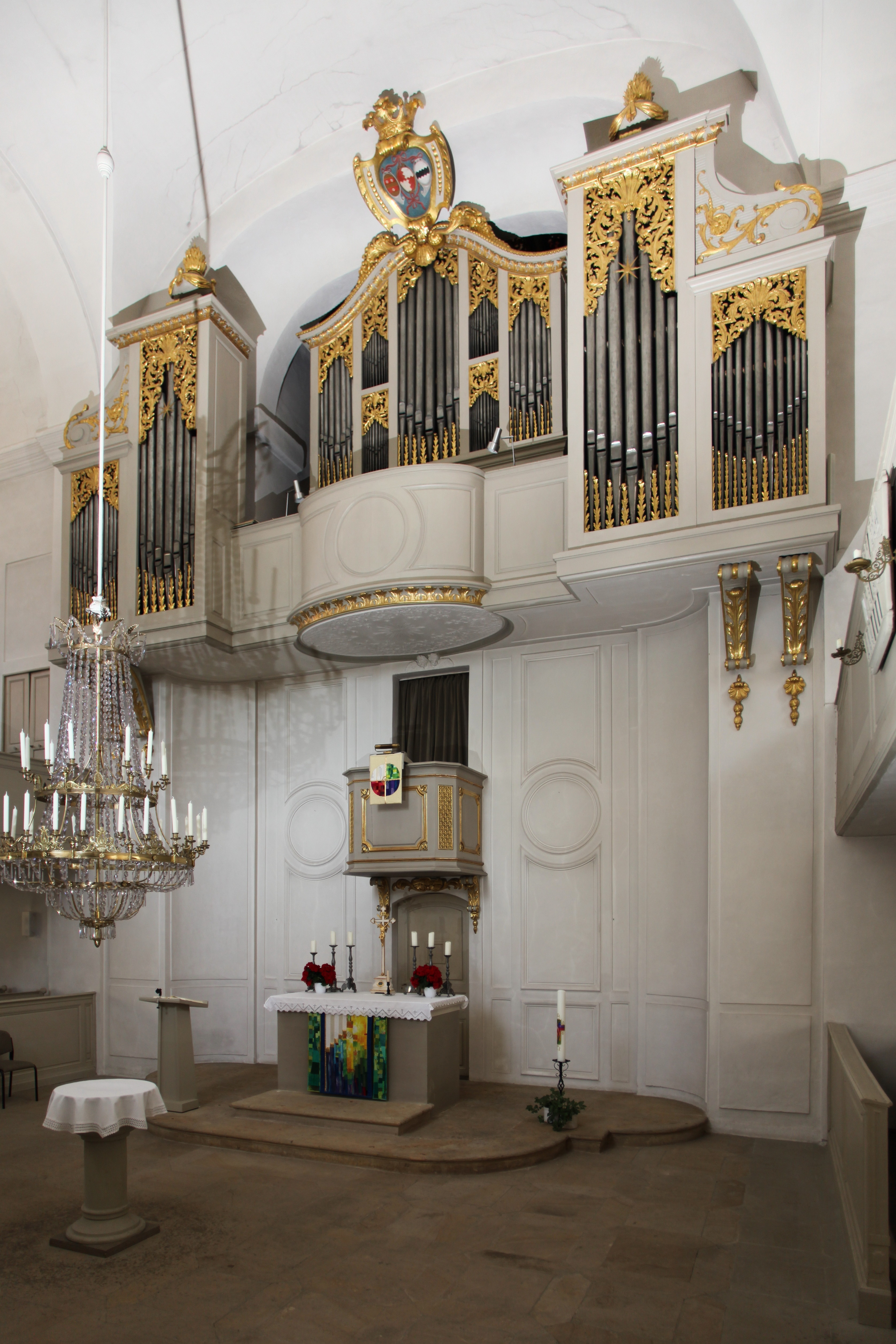 Kanzelaltar mit Herbst-Orgel von 1732, Schlosskirche in Lahm im Itzgrund